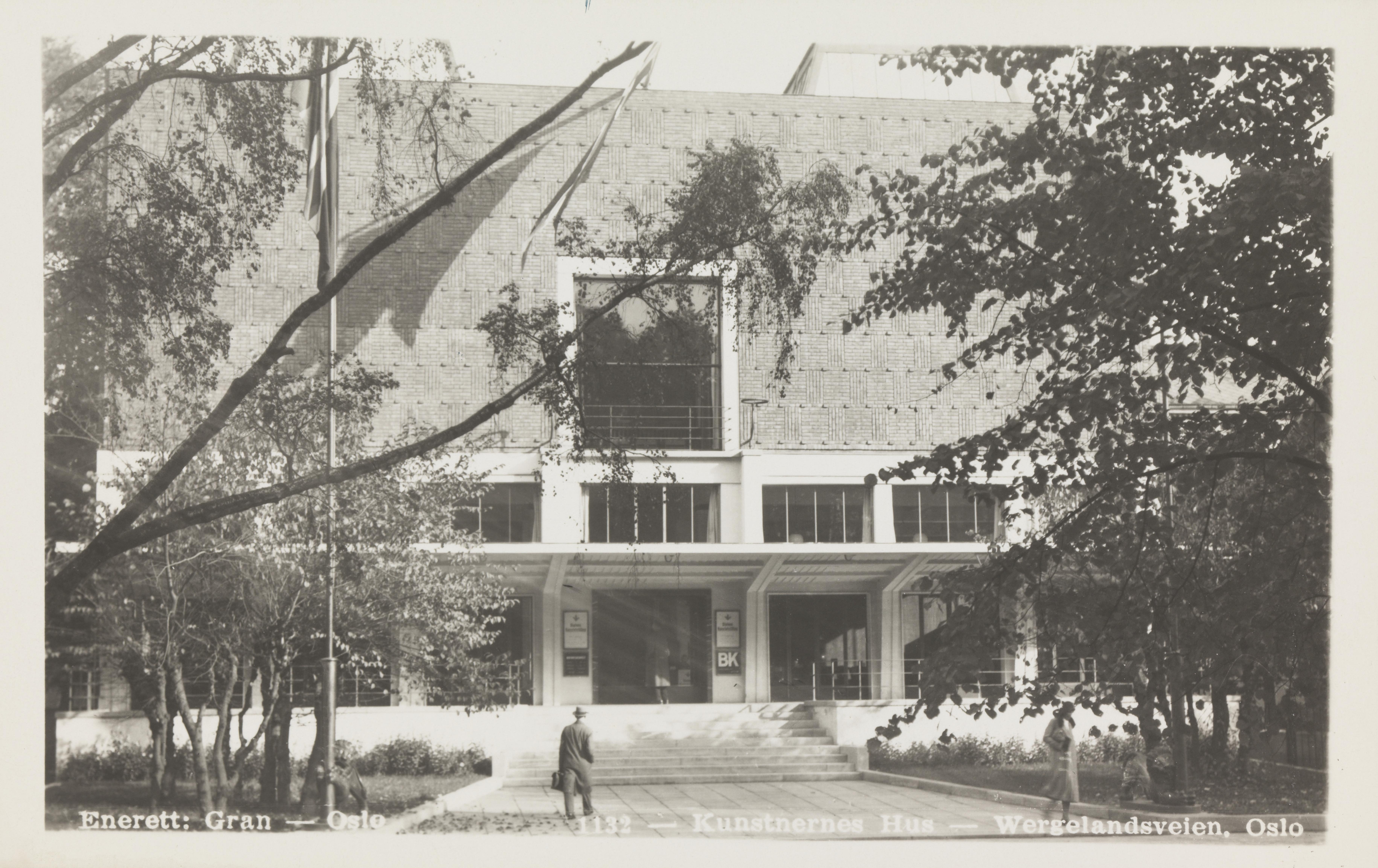 Bildet er hentet fra Nasjonalbibliotekets bildesamling Oslo, Oslo